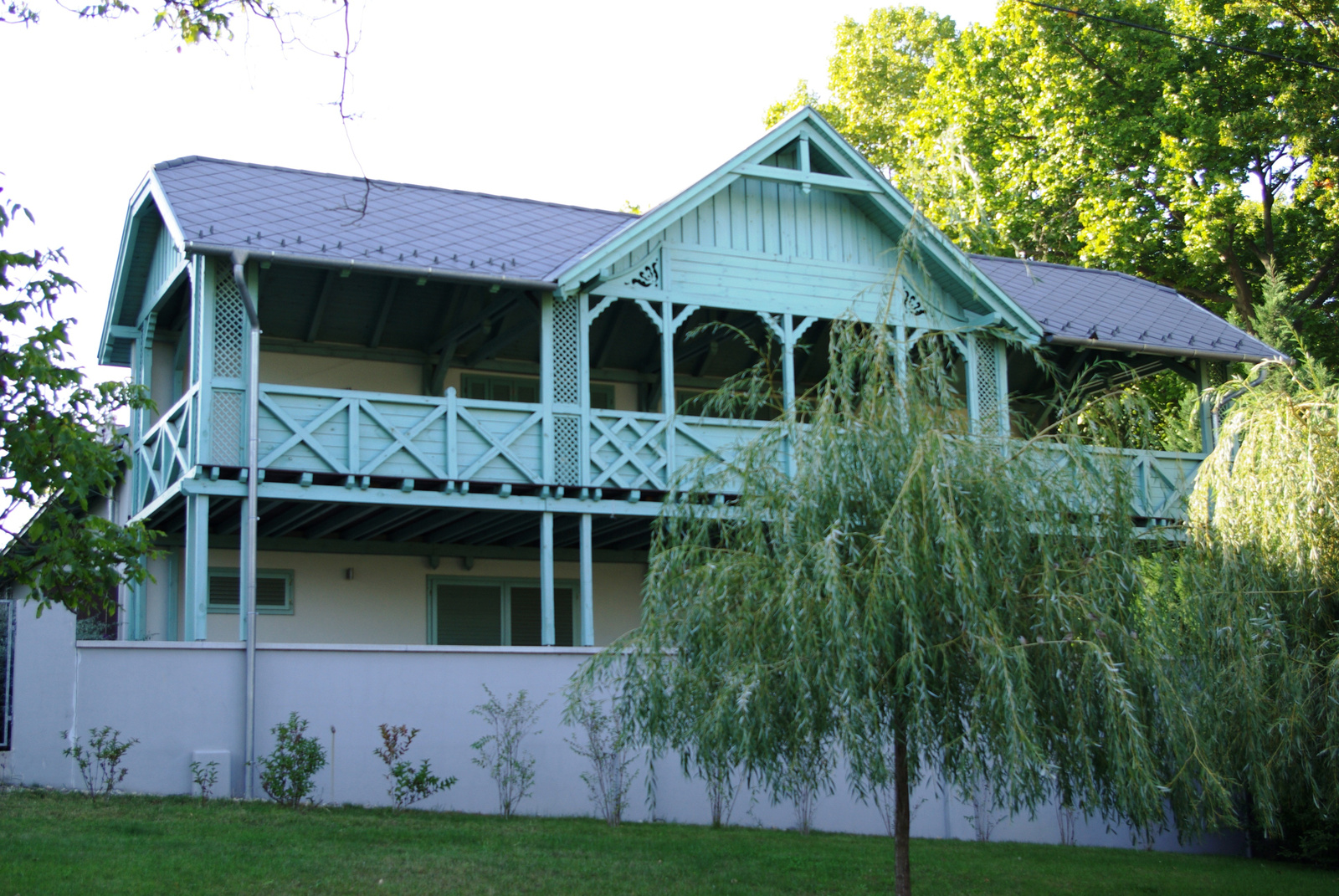 Bibic I. csónakház (Budapest 3, Római part 25. (Nánási út 39.)) This is a photo of a monument in Hungary. Identifier: 11187 Object location47° 34′ 14.38″ N, 19° 03′ 51.98″ E